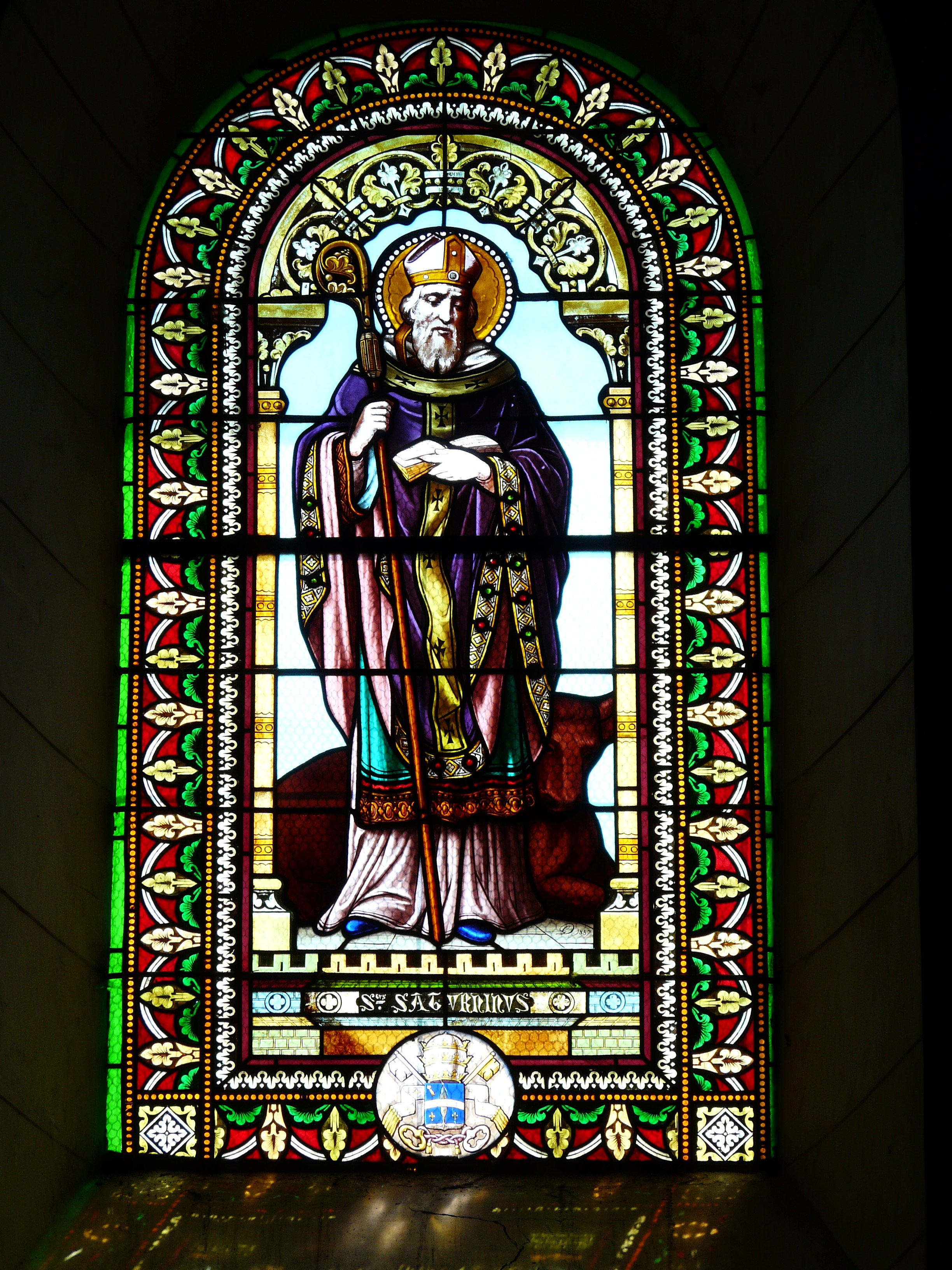 Vitrail de Gustave-Pierre Dagrant représentant saint Saturnin, église Saint-Saturnin, Quinsac, Dordogne, France